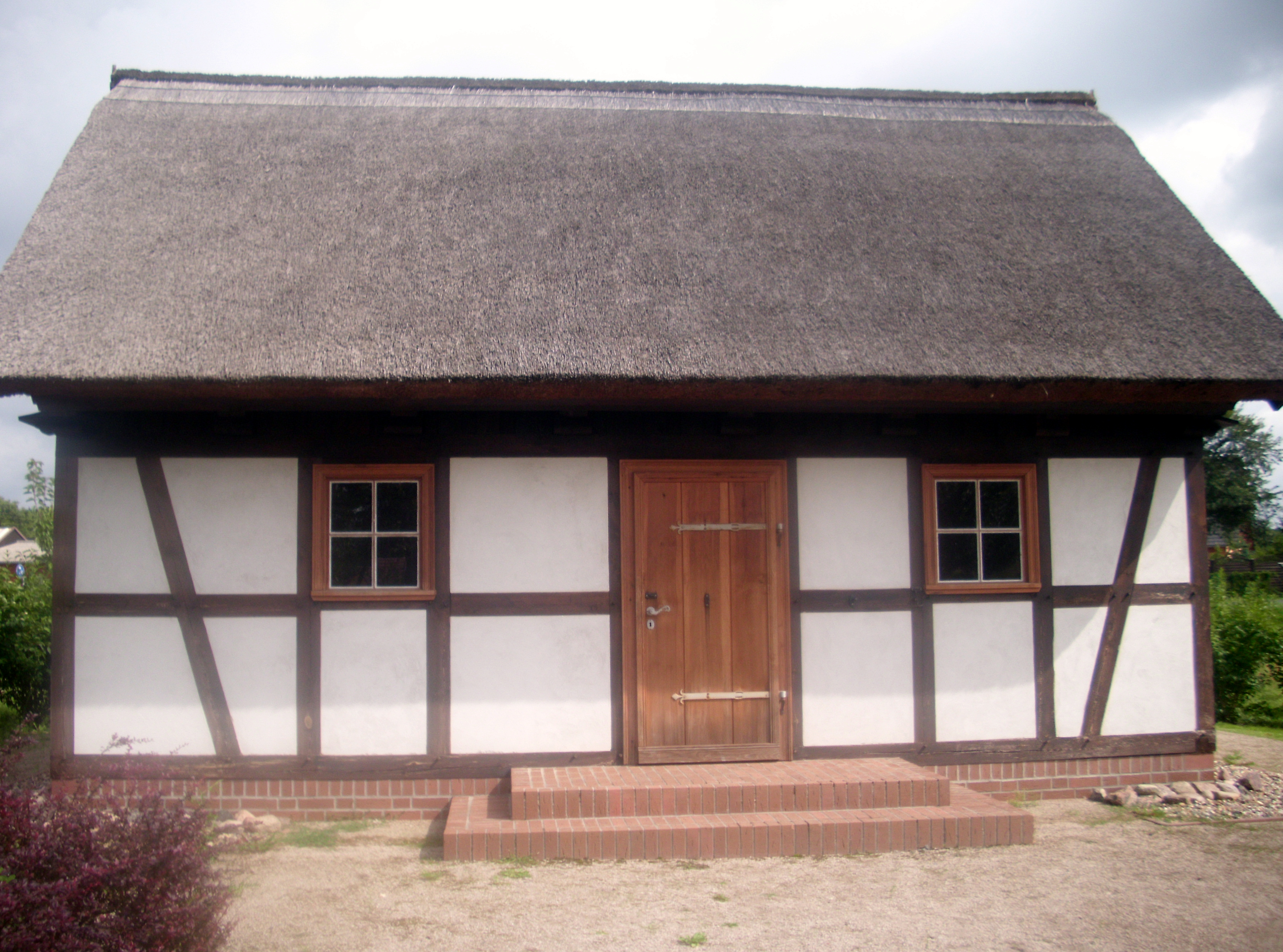 Nachbau des Jägerhaus in Schernsdorf, Gemeinde Siehdichum, Schlaubetal, Brandenburg